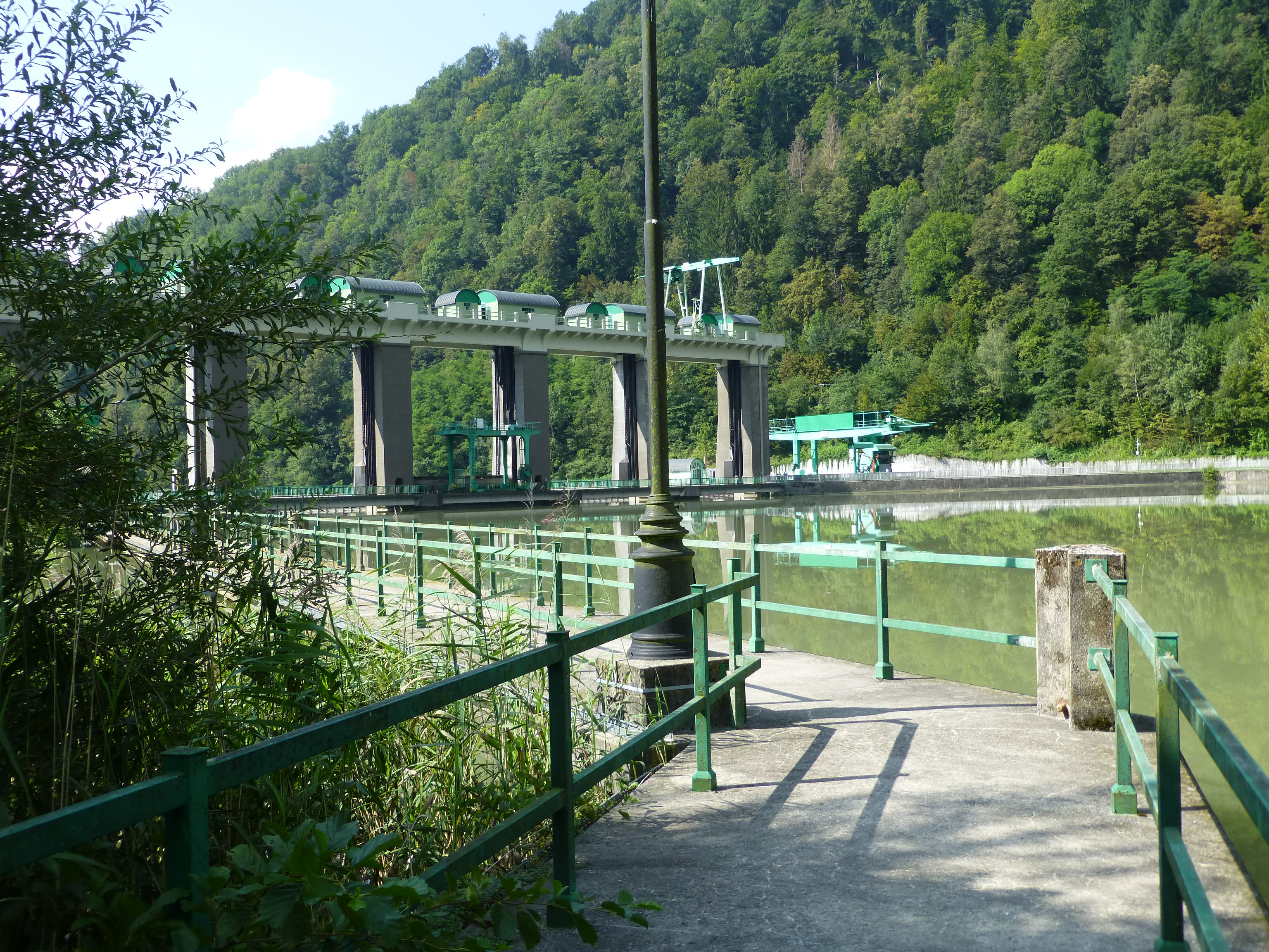 Barrage et centrale hydraulique sur la Drave, en amont de Selnica ob Dravi, à Fala, Styrie slovène. Le lieu est visitable (petit musée).